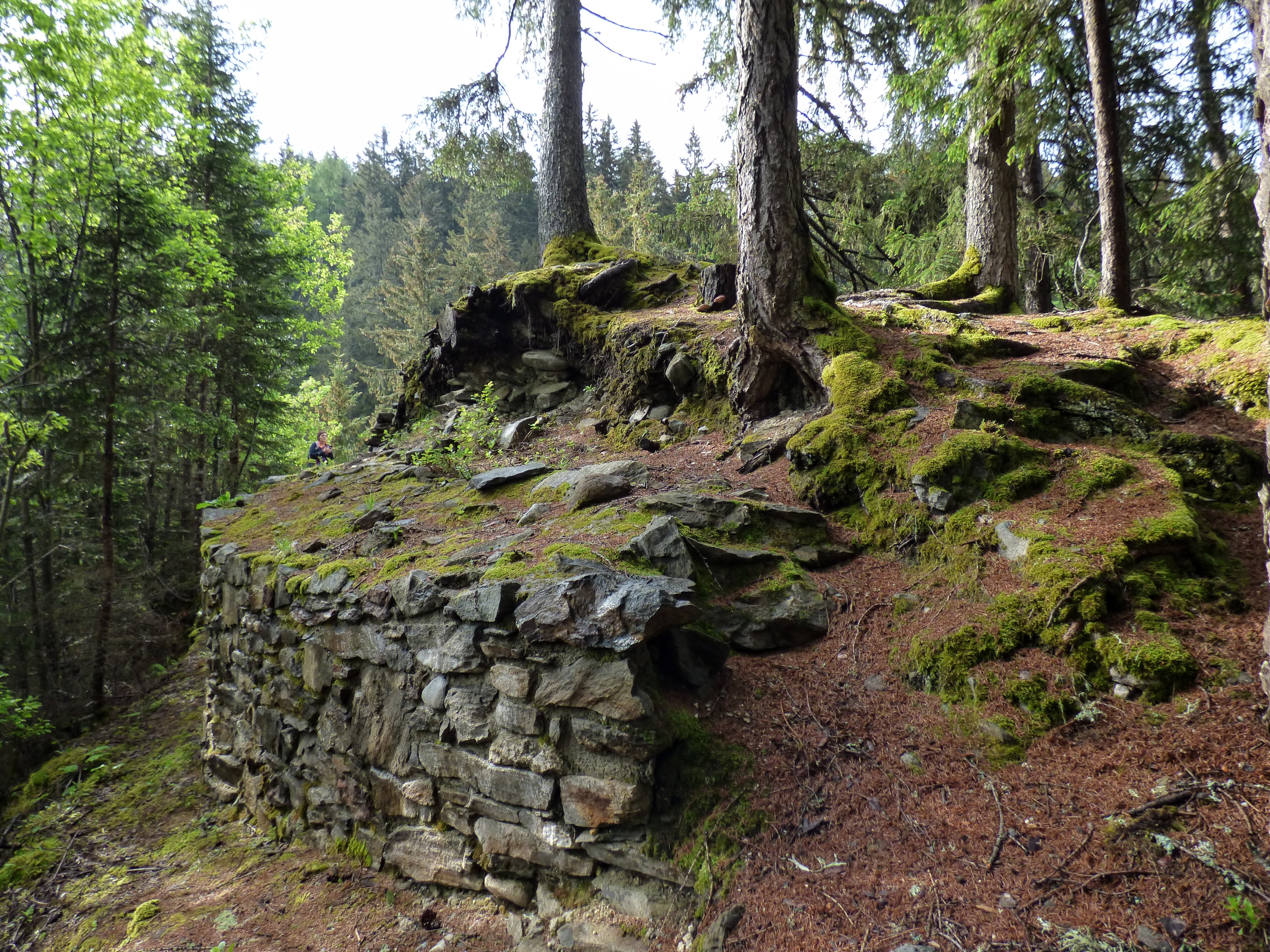 Ruine Edenvest, Gemeinde Thomatal (Salzburg)